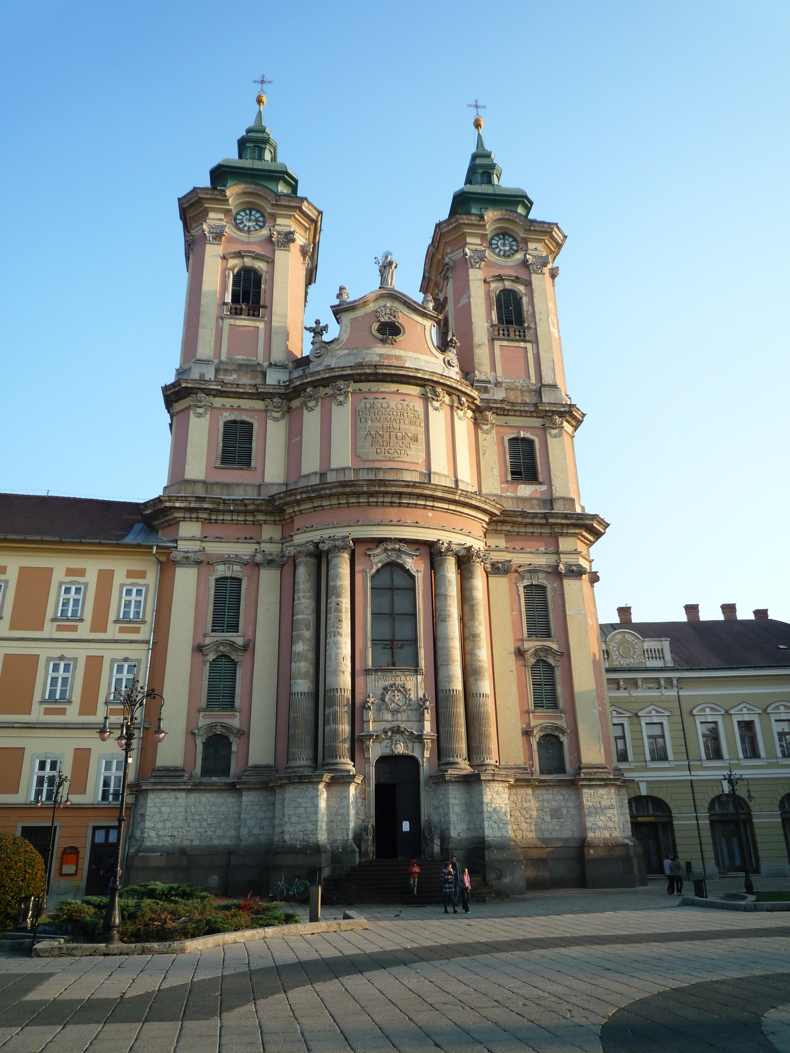 Minoritenkirche (Eger)